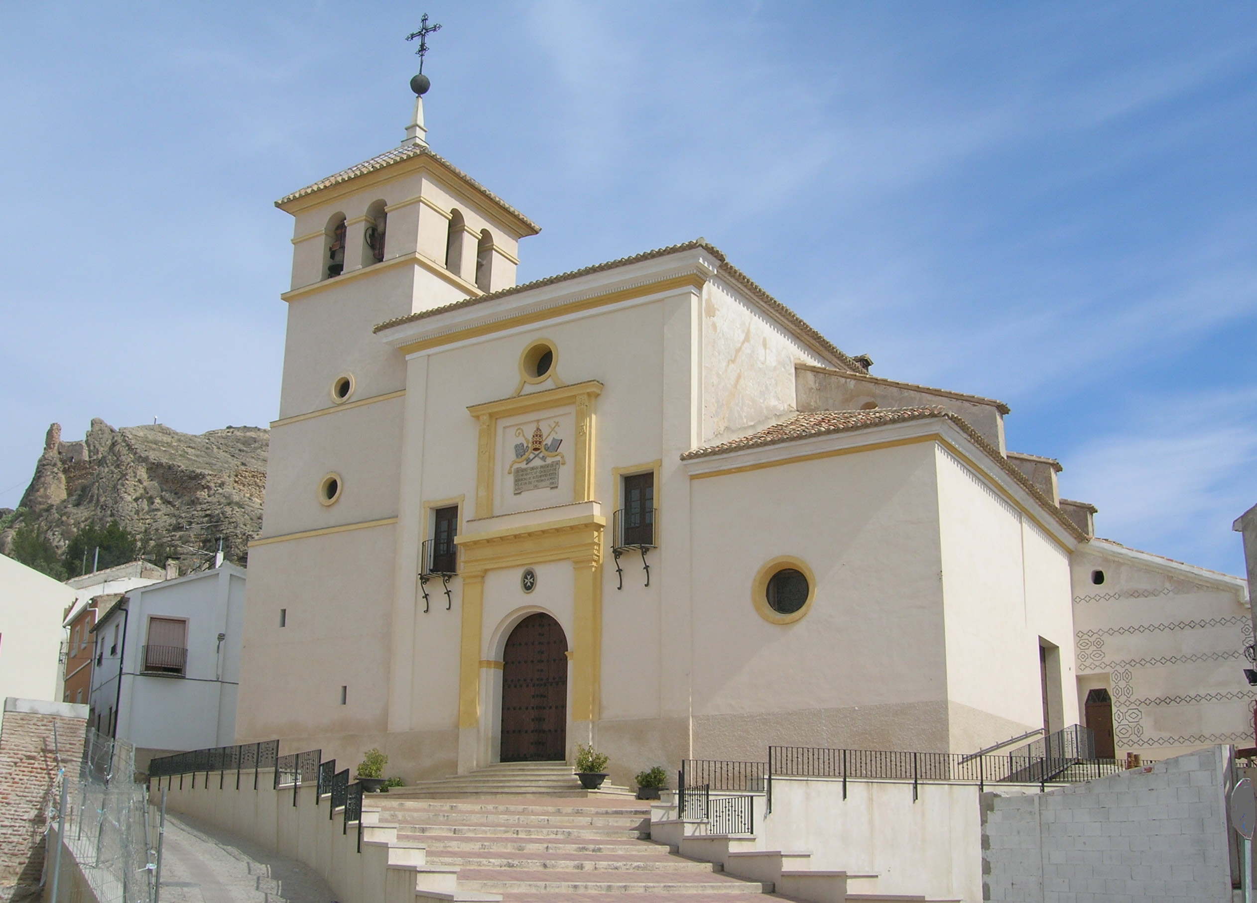 Iglesia de san Pedro Apóstol, o de San Pedro, en Calasparra, Murcia, España. Se reedificó en 1820.